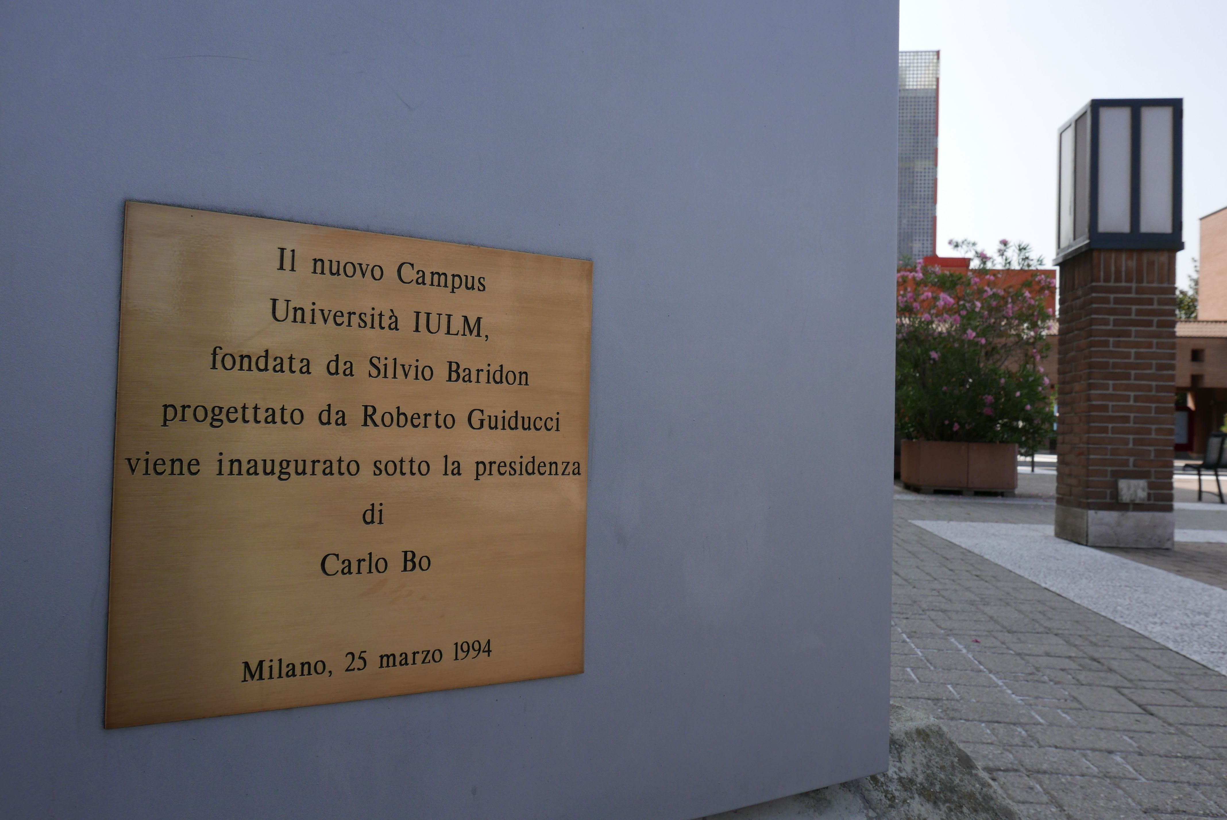 Targa commemorativa all'ingresso